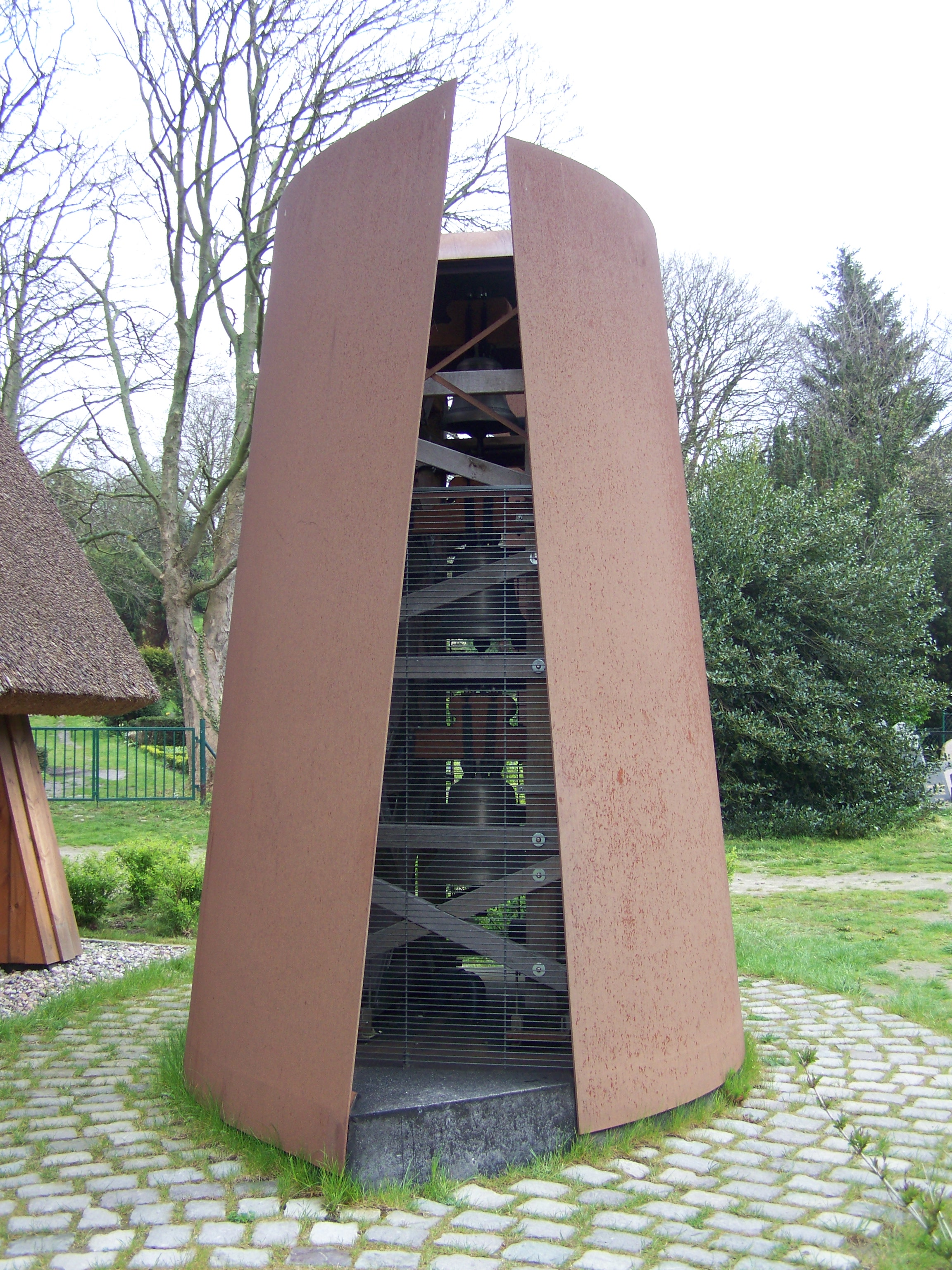 Schifferkirche Ahrenshoop Glockenturm (2008-05-01)